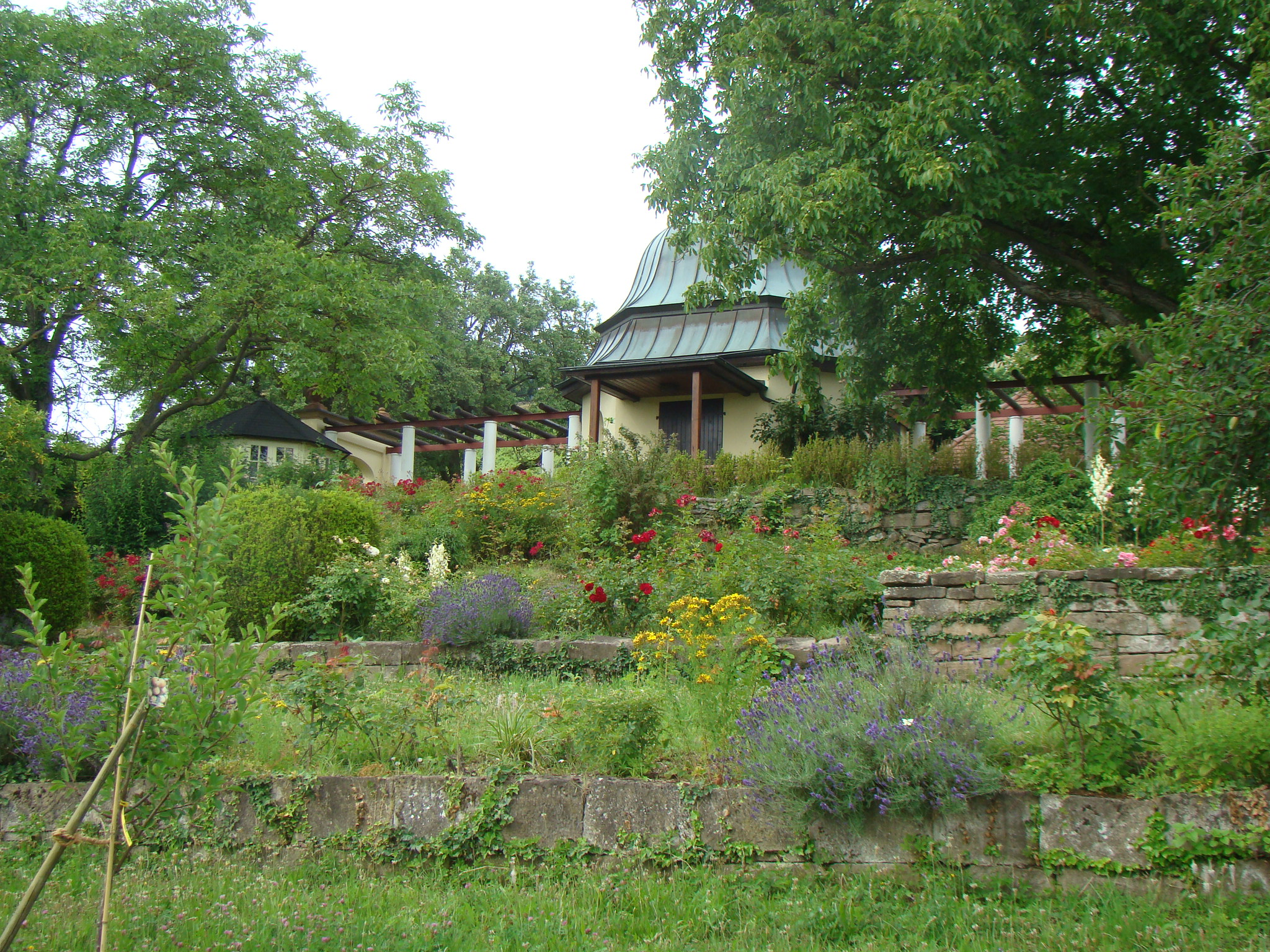 Seniorengarten mit denkmalgeschütztem Gartenbelvedere in Heilbronn